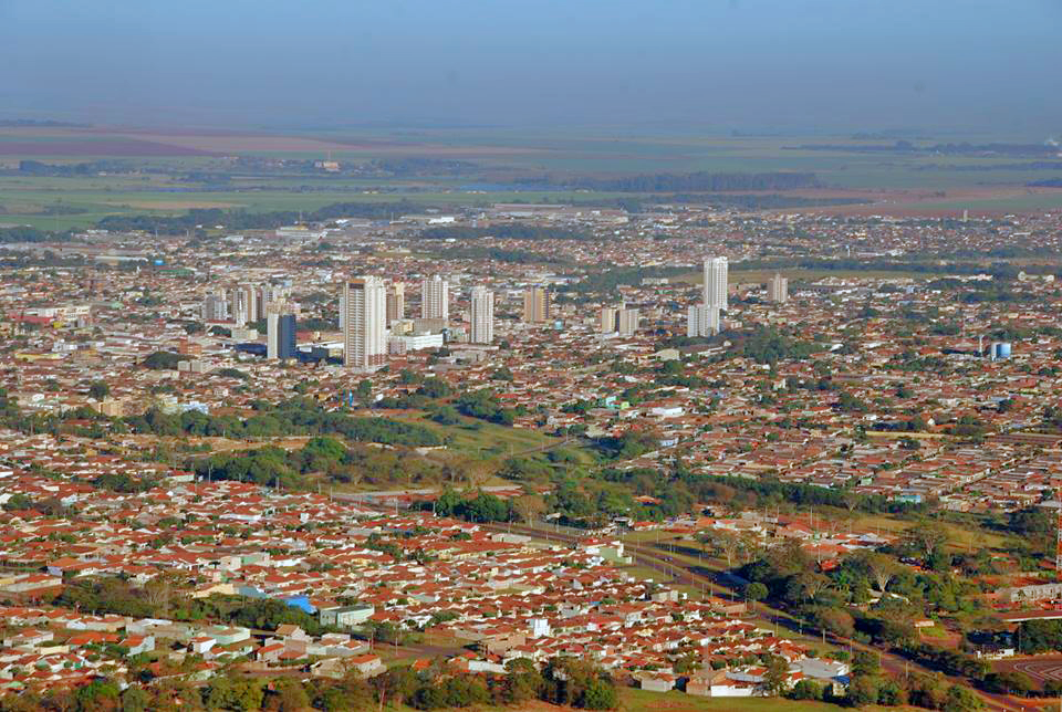 Imagem aérea de Sertãozinho/SP em 2016